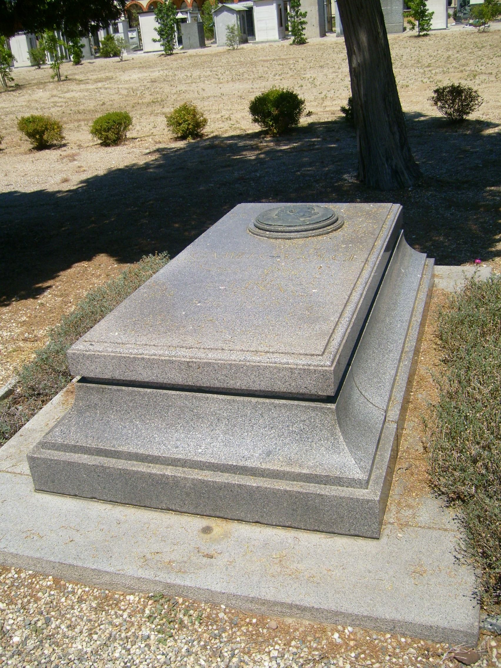 Camillo Golgi's grave; Cimitero Monumentale, Pavia, Italy